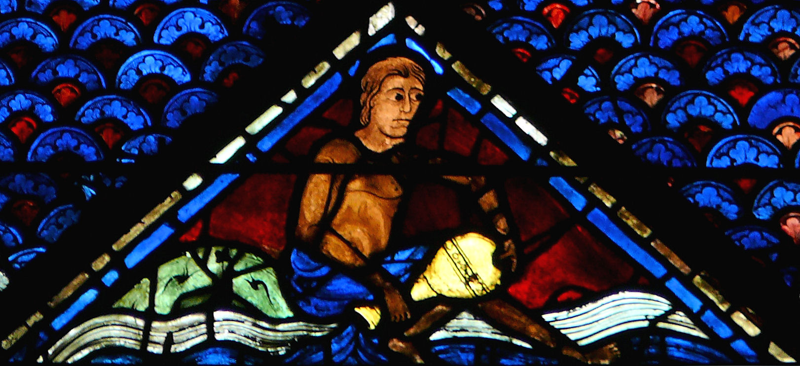 Cathédrale de Chartres - Vitrail - Potier